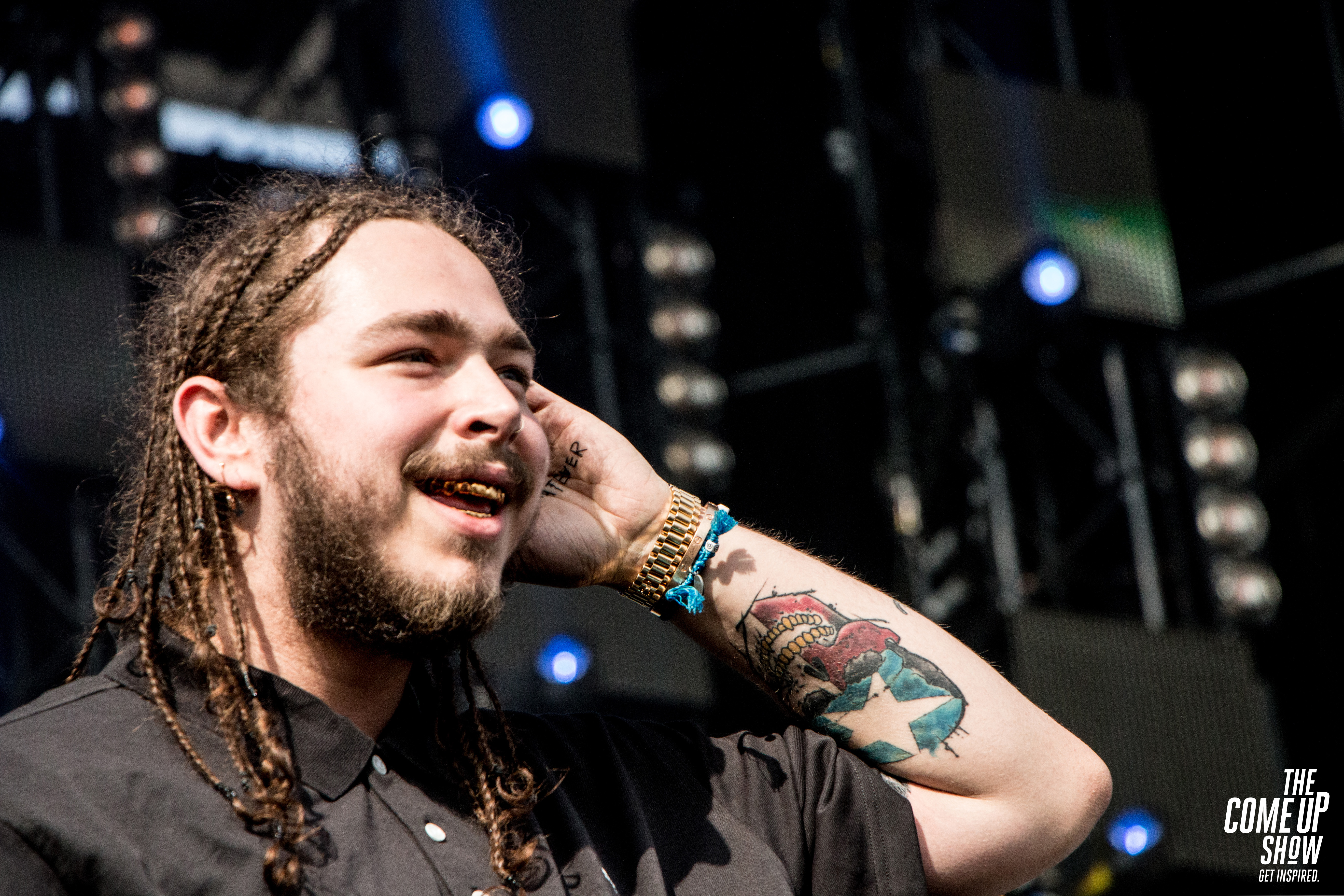 VELD 2016